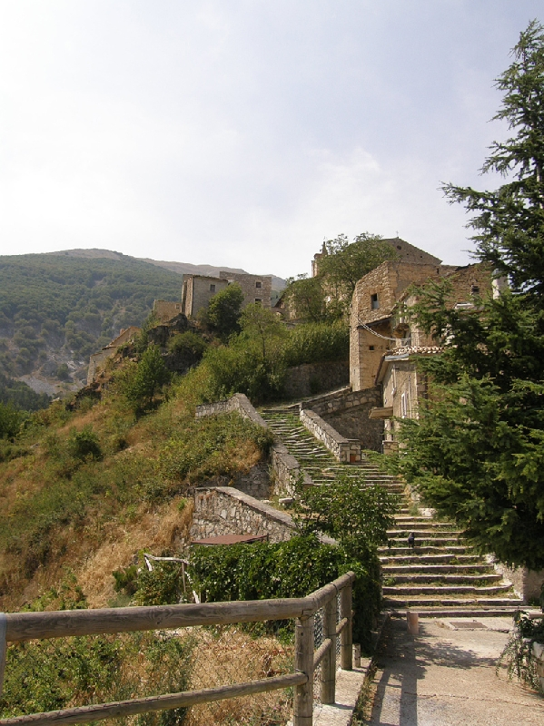 Roccacaramanico